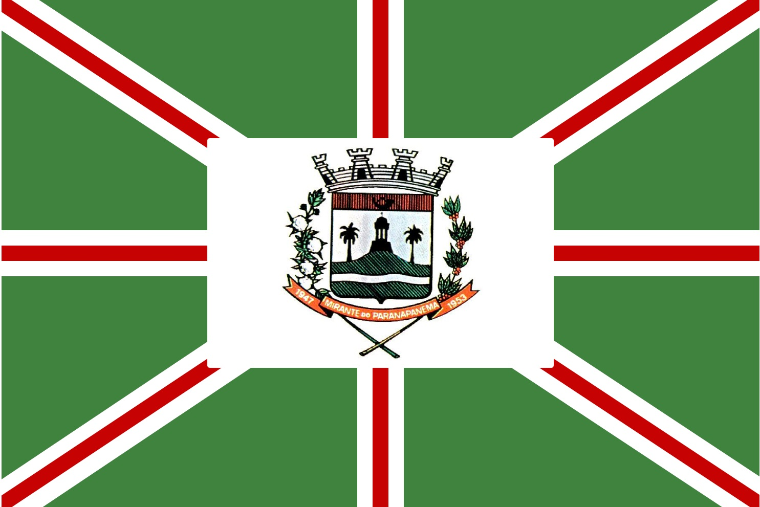 Bandeira de Mirante do Paranapanema, município fundado em 1954